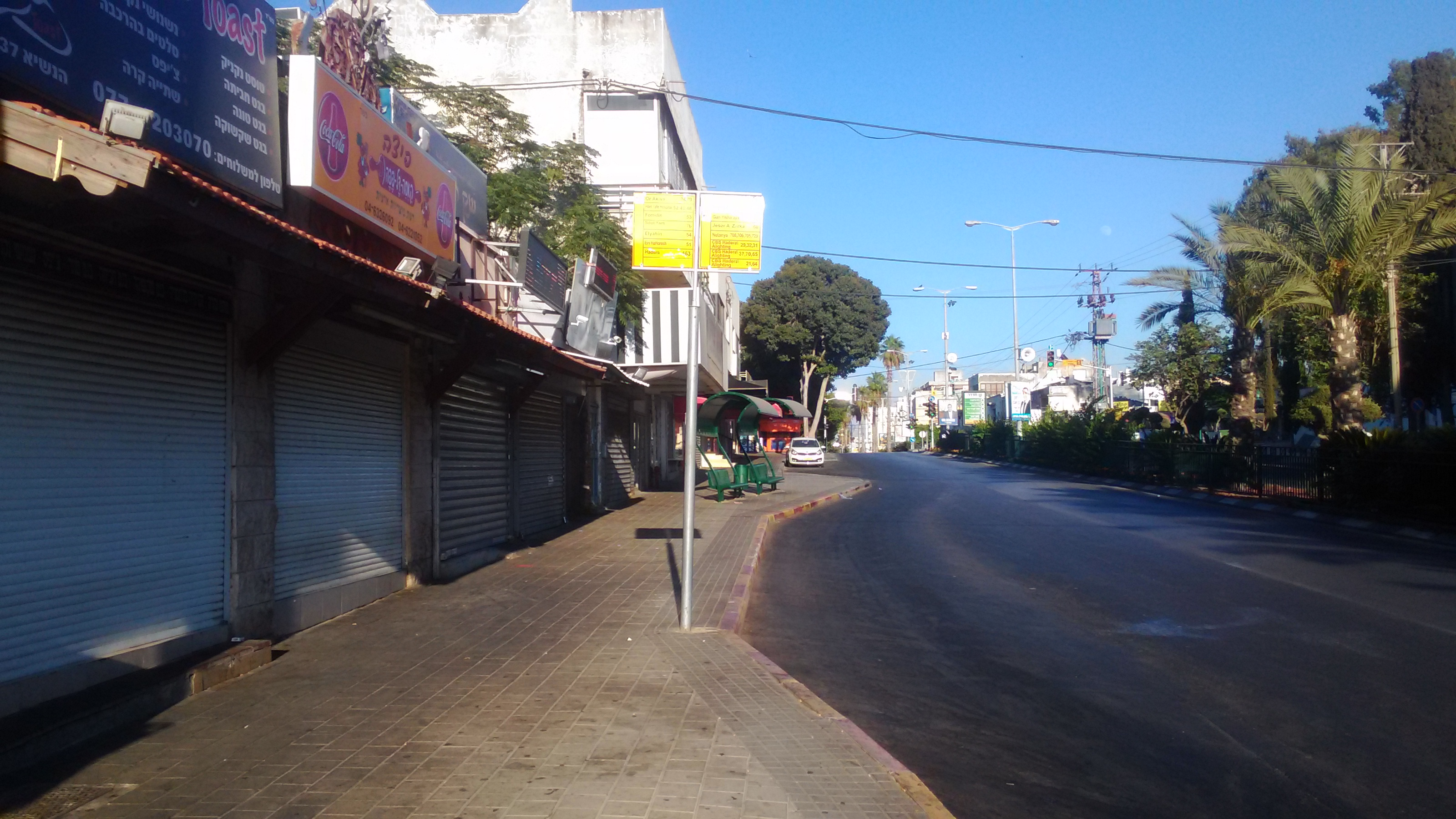 מקום הפיגוע